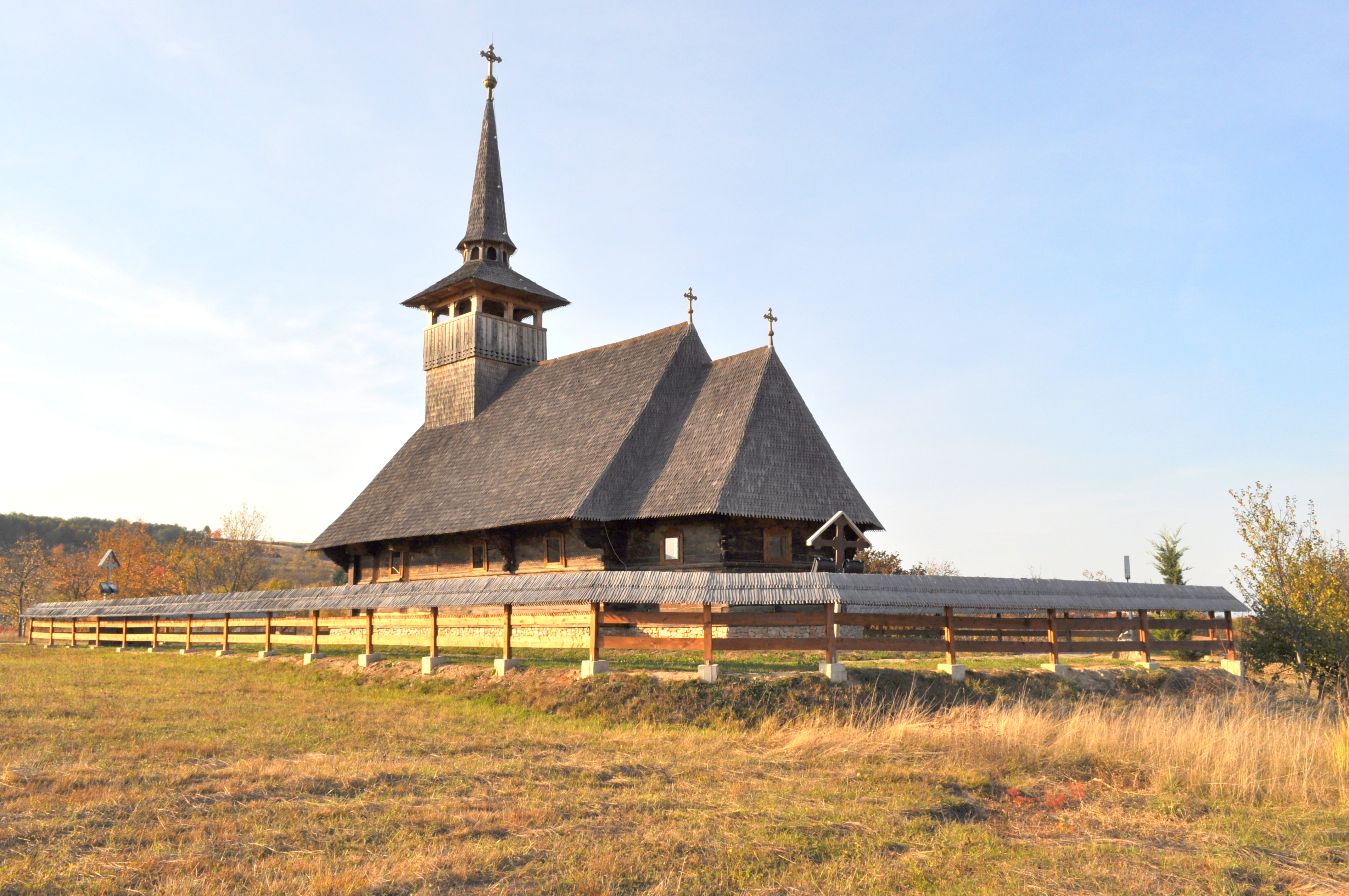 Biserica de lemn „Sf. Trei Ierarhi" din Ghighișeni mutată la Cucuceni